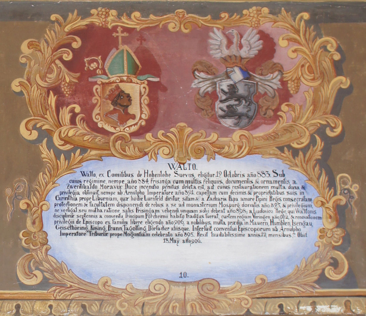 Wappentafel von Waldo, Bischof von Freising, im Fürstengang zwischen Fürstbischöflicher Residenz und Freisinger Dom. Links das geistliche, rechts das persönliche Wappen, darunter ein lateinischer Text mit kurzer Biographie.